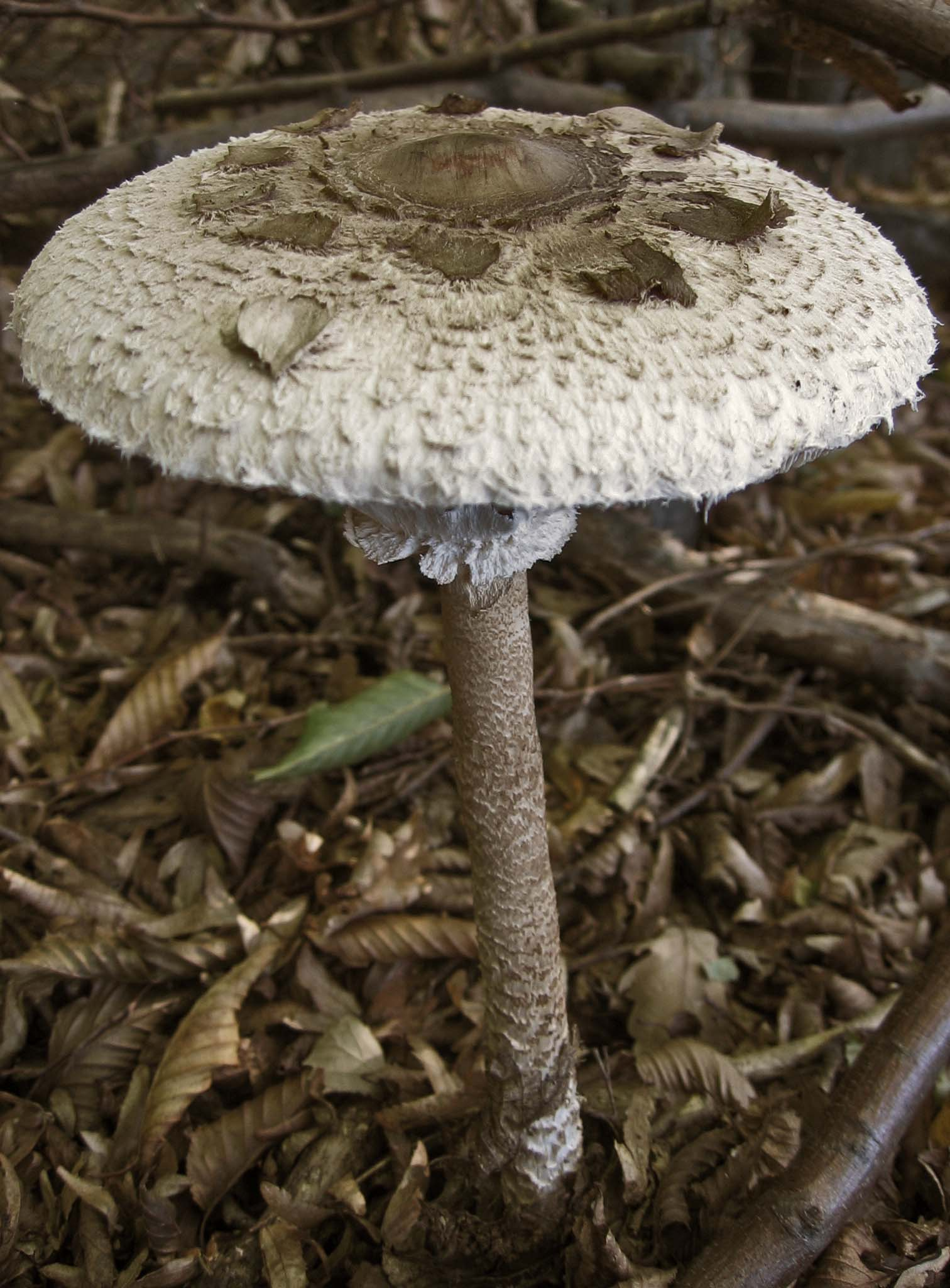 Macrolepiota proceraSlovenčina: Bedľa vysoká